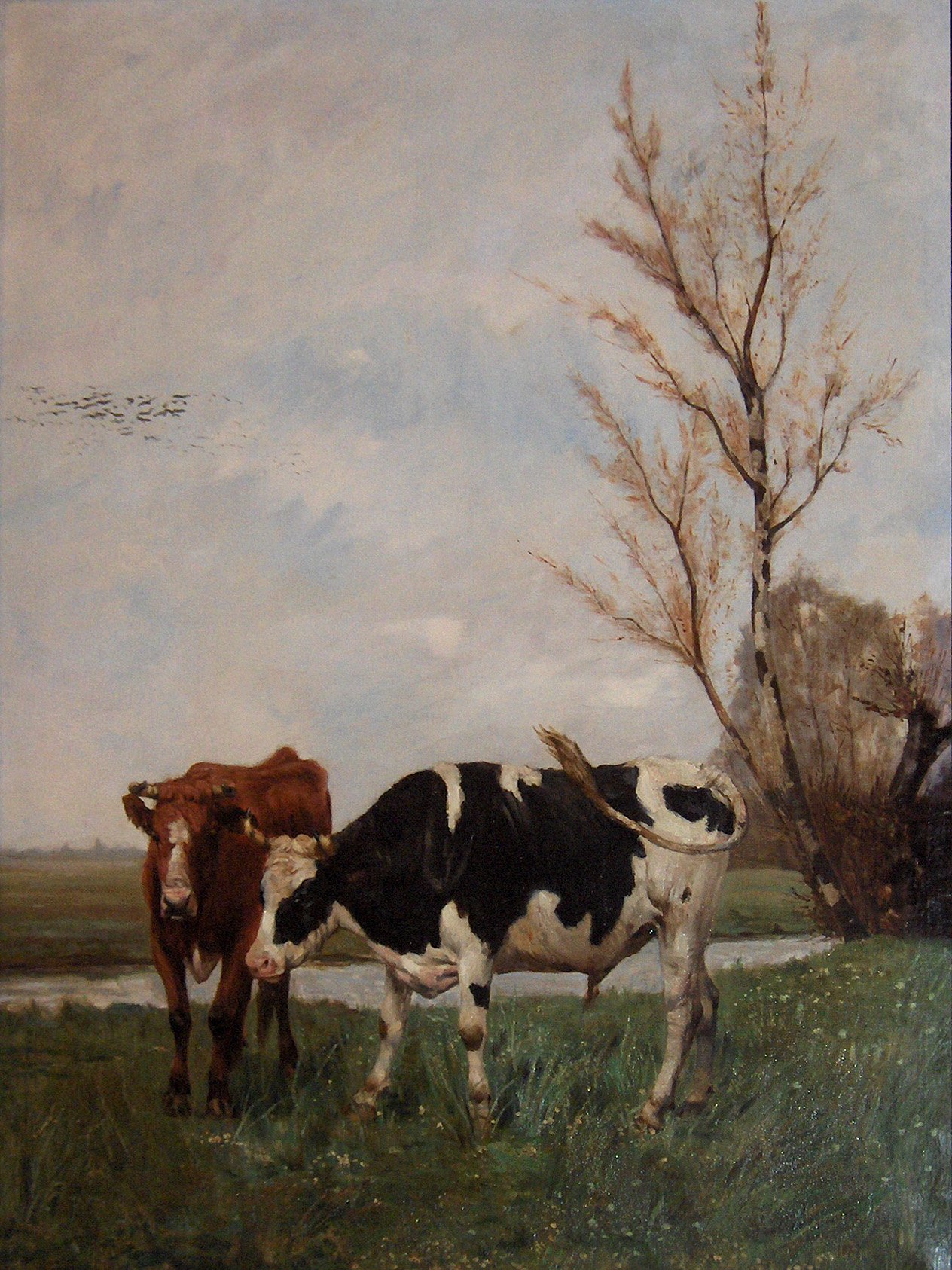 "Stieren aan een poel (1877), schilderij